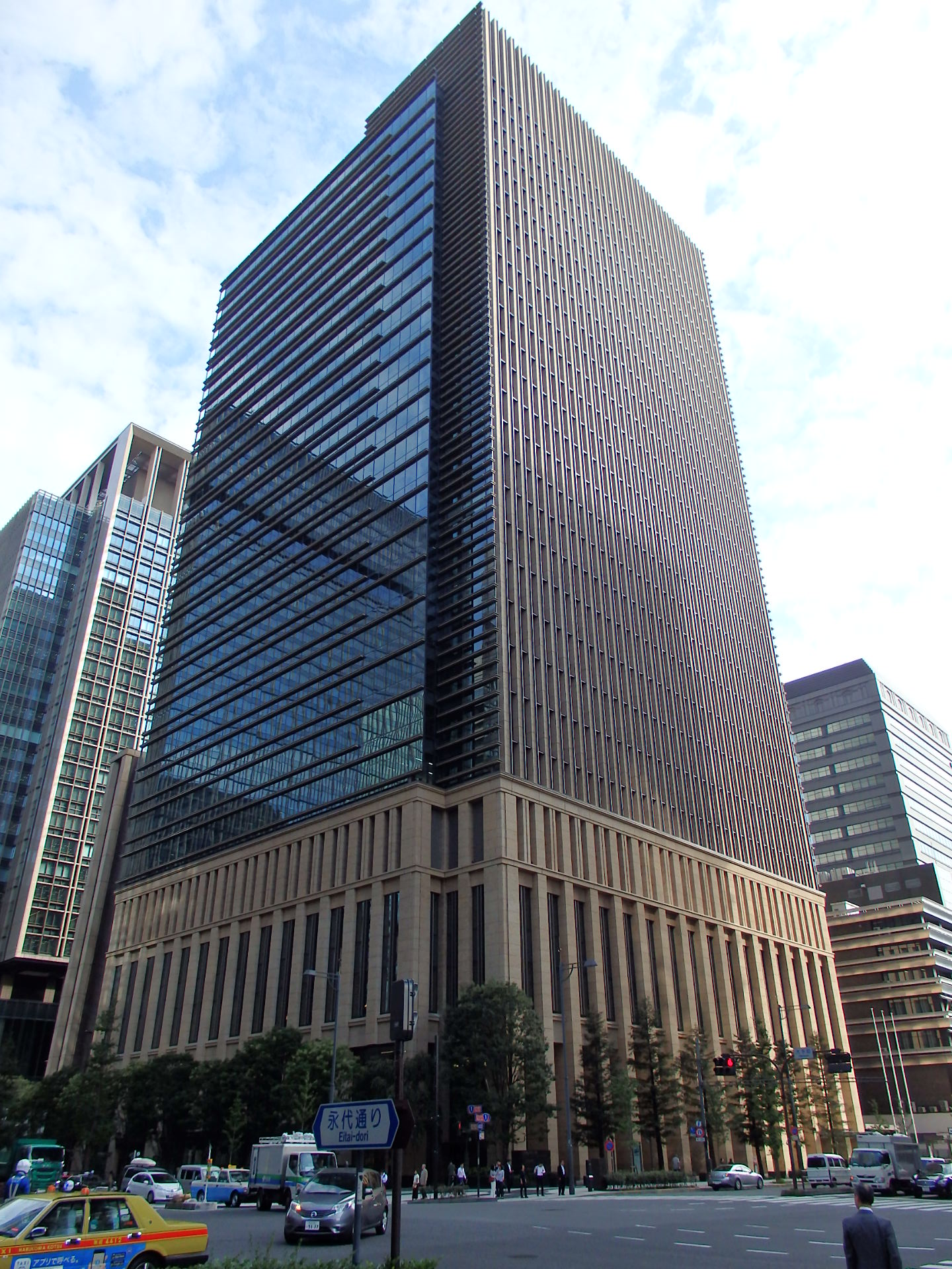 三井住友銀行東館